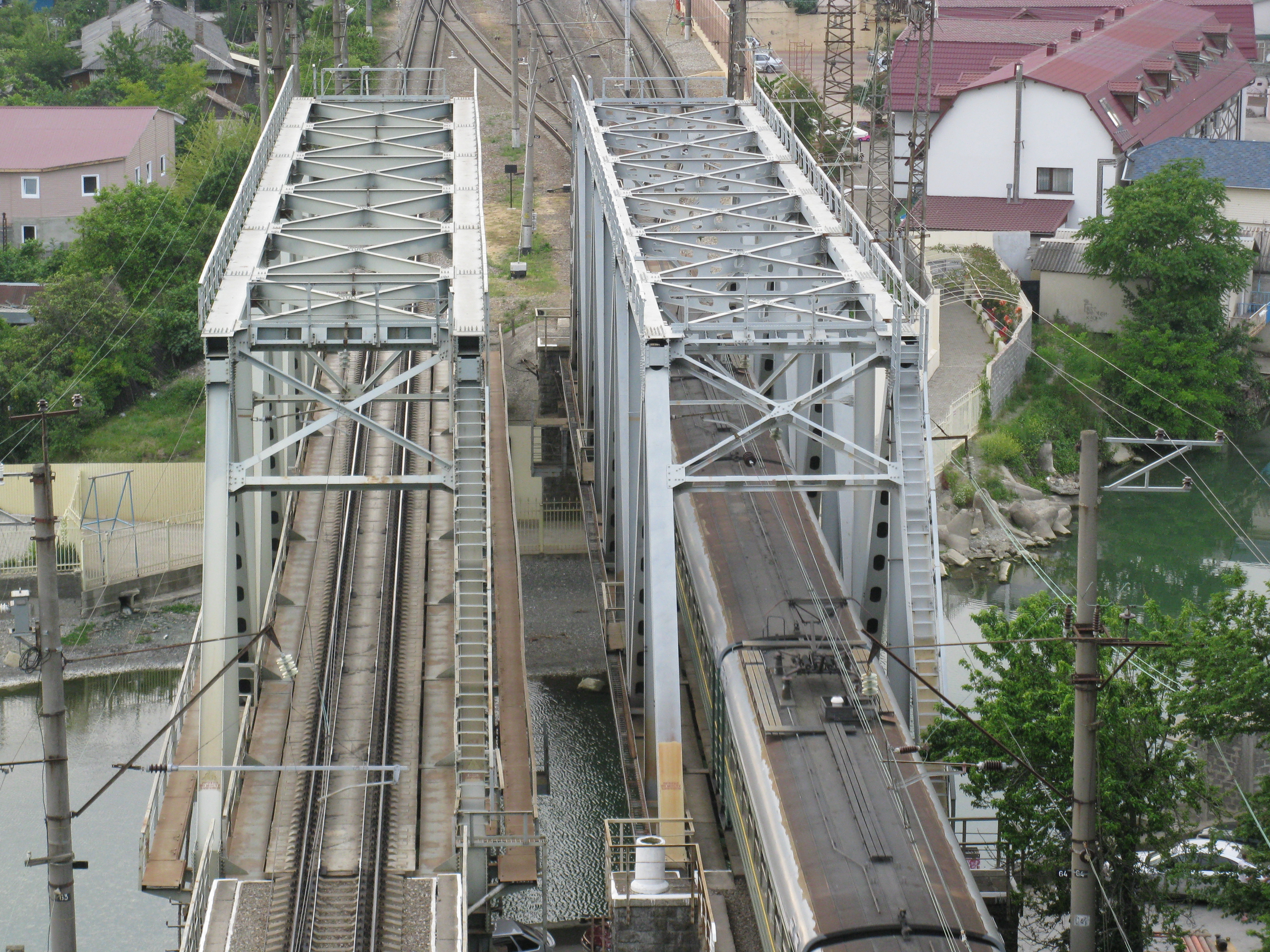 железнодорожный мост через реку Дагомыс